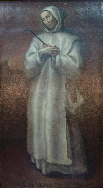 La obra representa a San Bruno de Colonia, el fundador de la Orden de los cartujos.